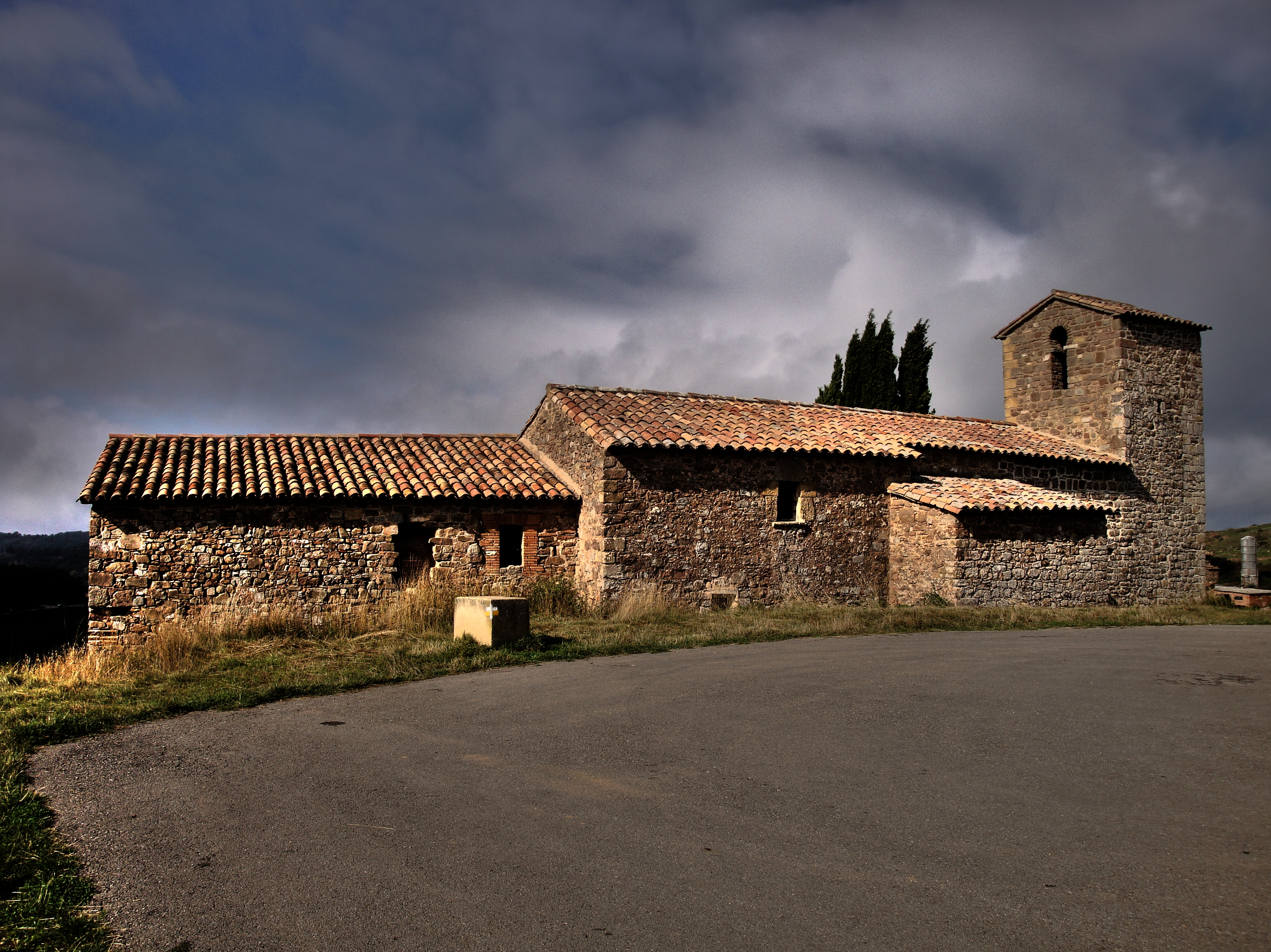 Hubicat a la part alta de la població de collsuspina a la comarca d´osona